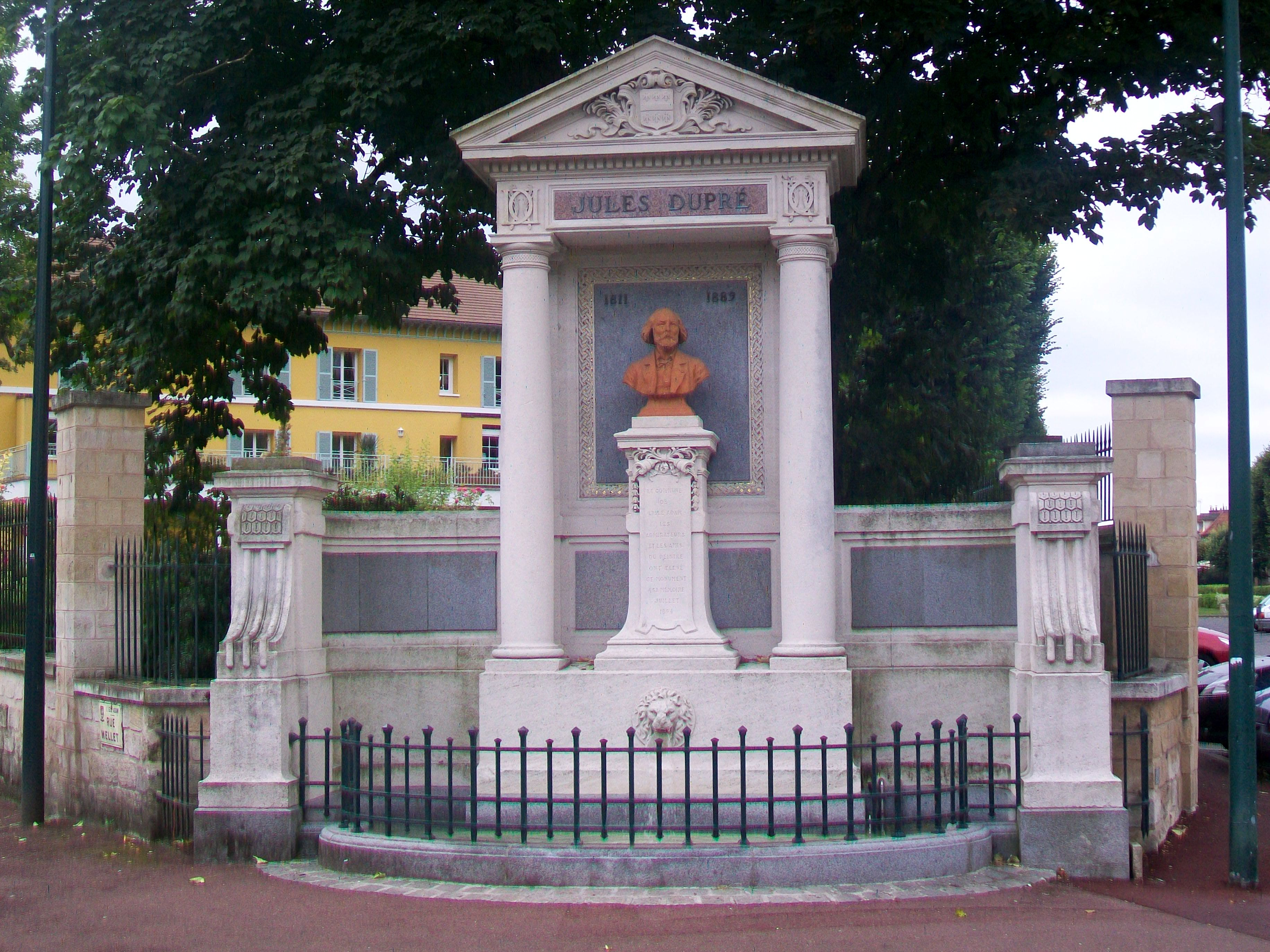 Monument et fontaine pour l'artiste-peinte Jules Dupré (1811-1889).